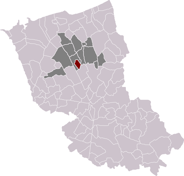 Locatie gemeente Bissezele in arrondissement Duinkerke. Zelfgemaakt. Location of Bissezeele municipality in the arrondissement of Dunkirk. Self made. Localisation de la commune de Bissezeele dans l'arrondissement de Dunkerque. Fait moi-même.